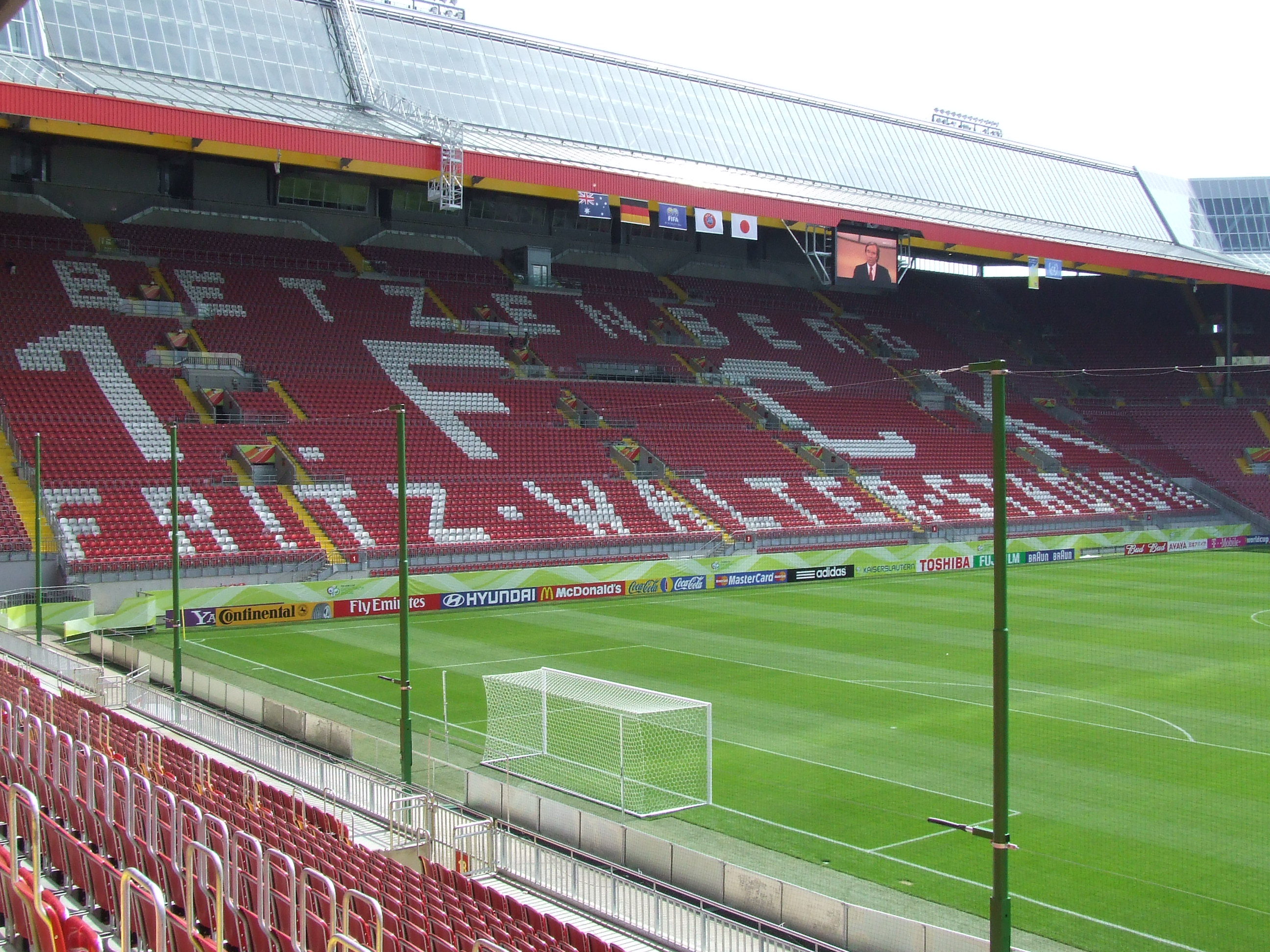 Fritz-Walter-Stadion in Kaiserslautern, vor dem FIFA WM-Spiel Australien gegen Japan